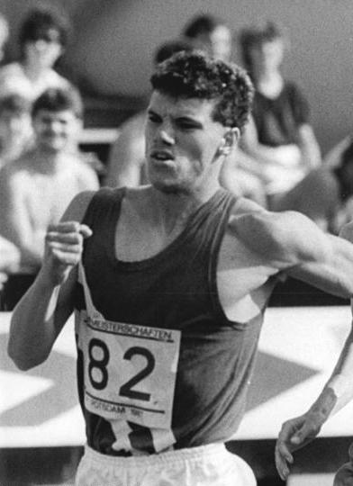 Hauke Fuhlbrügge ADN-ZB Koard 24.8.87-A-Potsdam: 38. DDR-Leichtathletik-Meisterschaften.